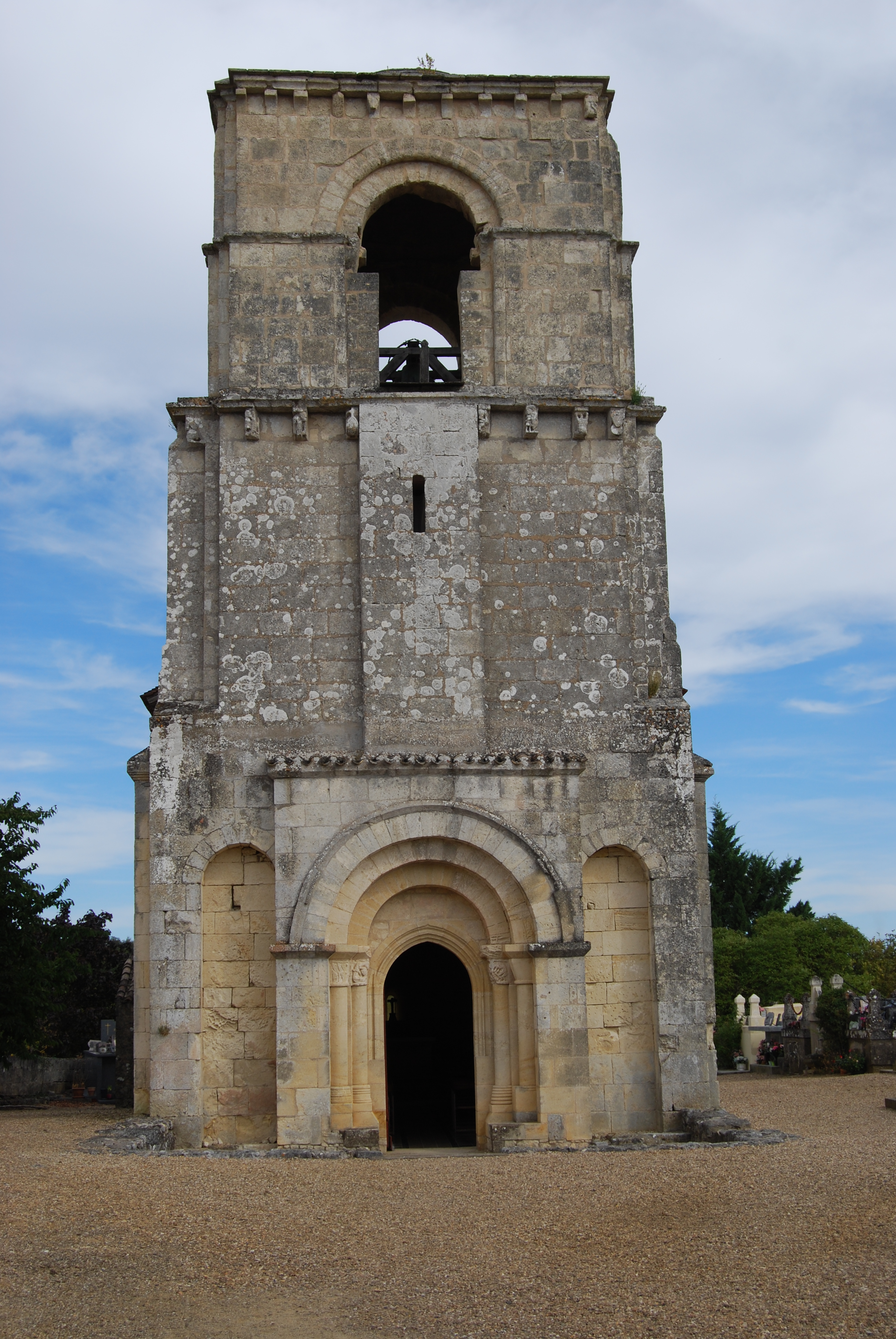 Église Notre-Dame de Parsac, (Classé, 2002) .